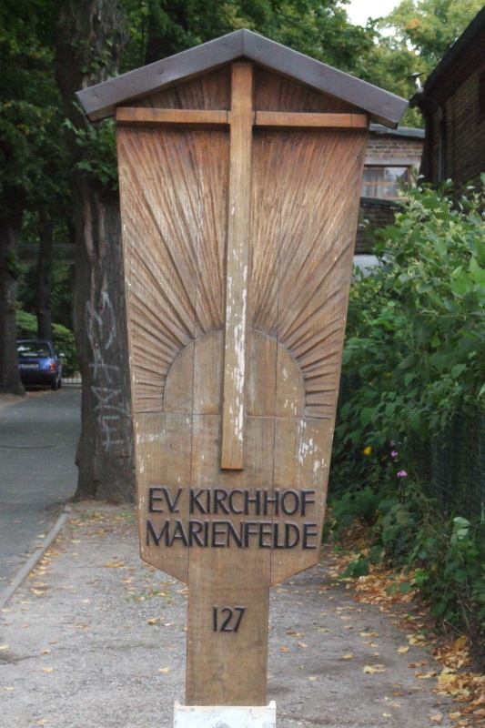 Kirchhof Berlin-Marienfelde:Der Wegweiser Fotograf: Harald Rossa Datum: September 2006 Höher aufgelöste Version ist verfügbar